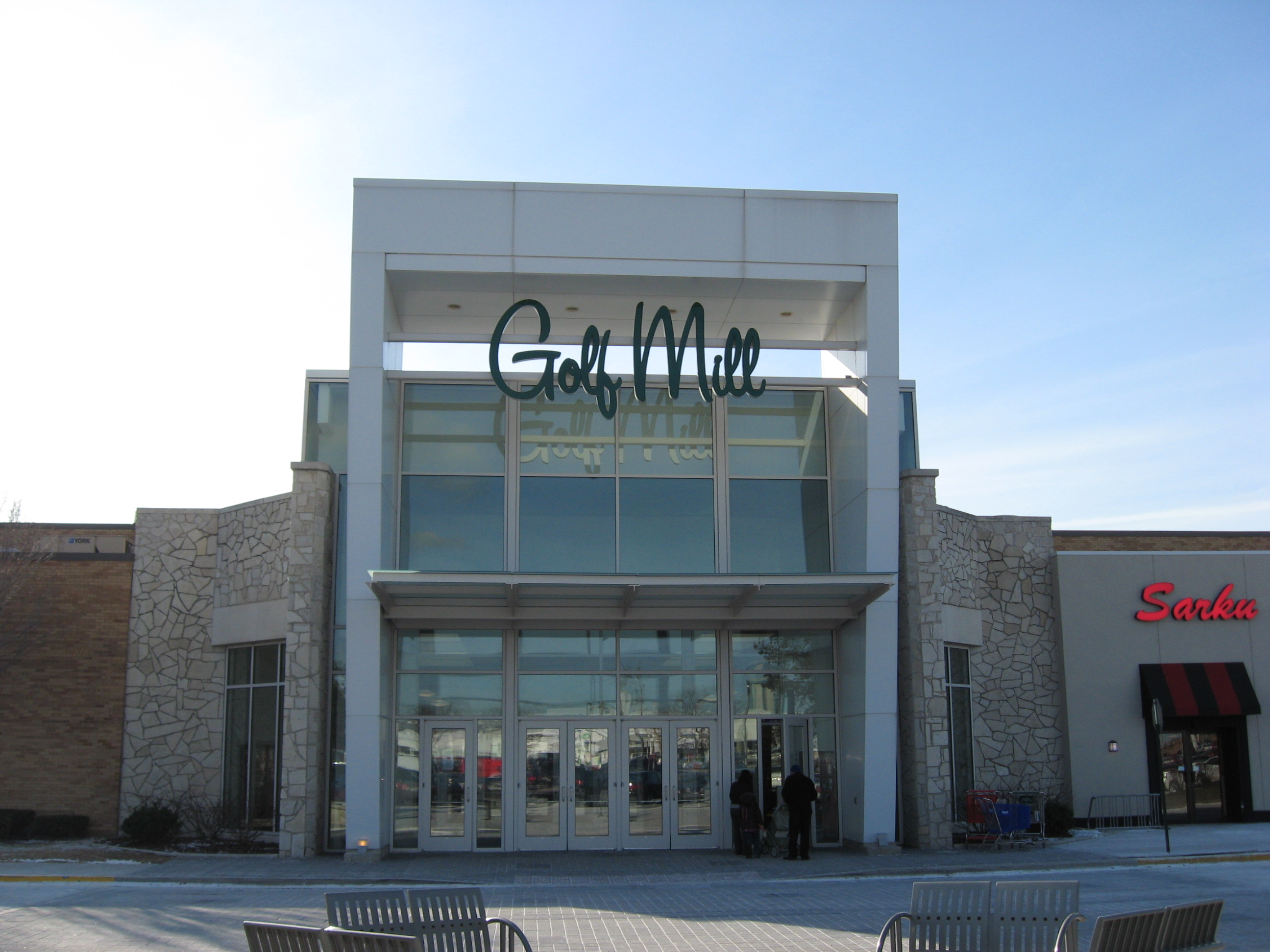 Golf Mill Mall, Niles, Illinois